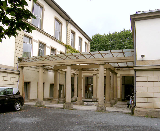 Städelschule Frankfurt am Main Eingang